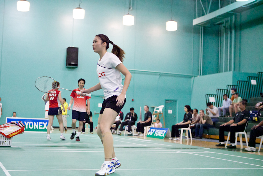 Kunchala Voravichitchaikul